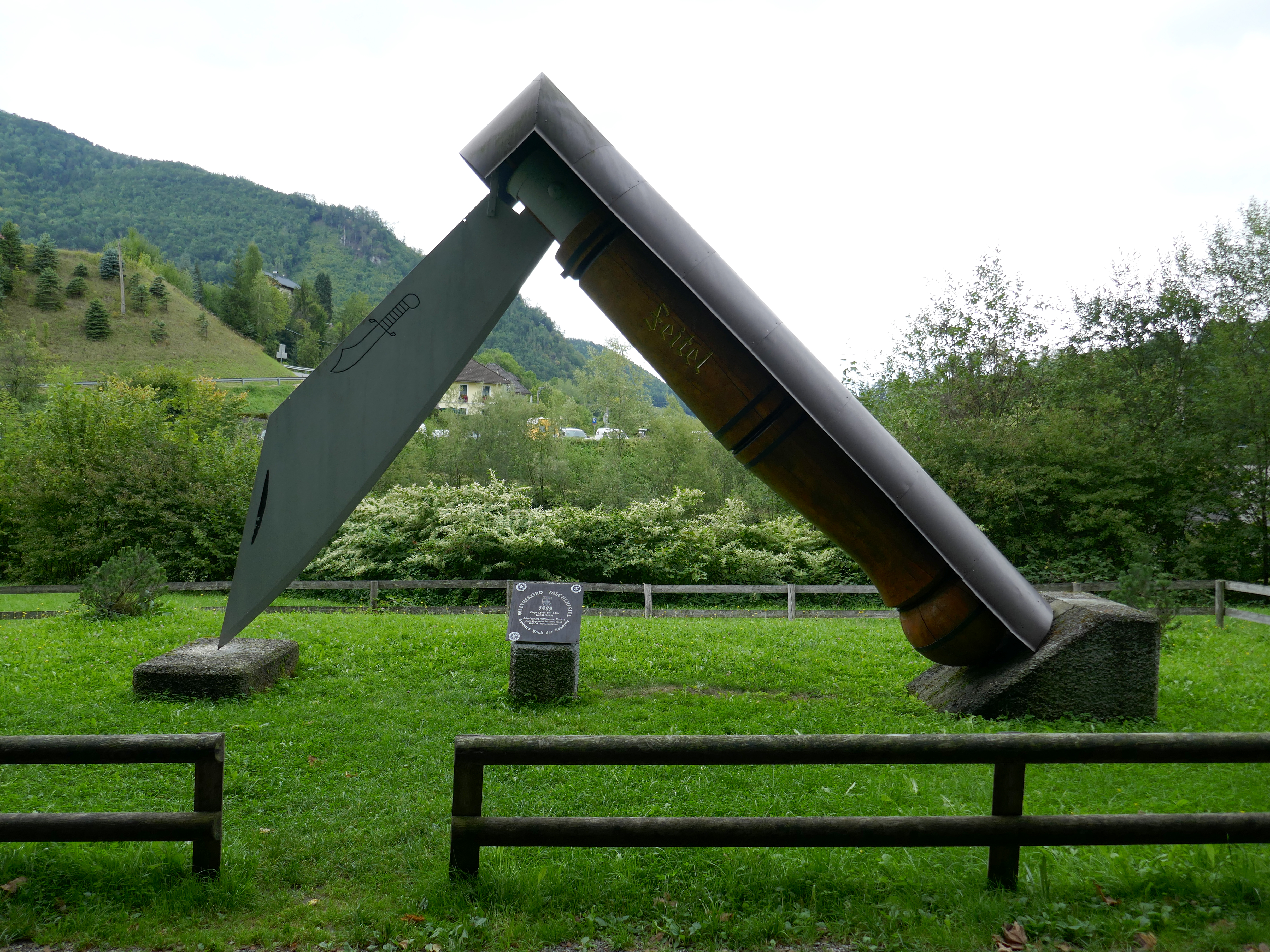 Im Tal der Feitelmacher, Trattenbach - Weltrekordfeitel (Trattenbacher Zauckerl).